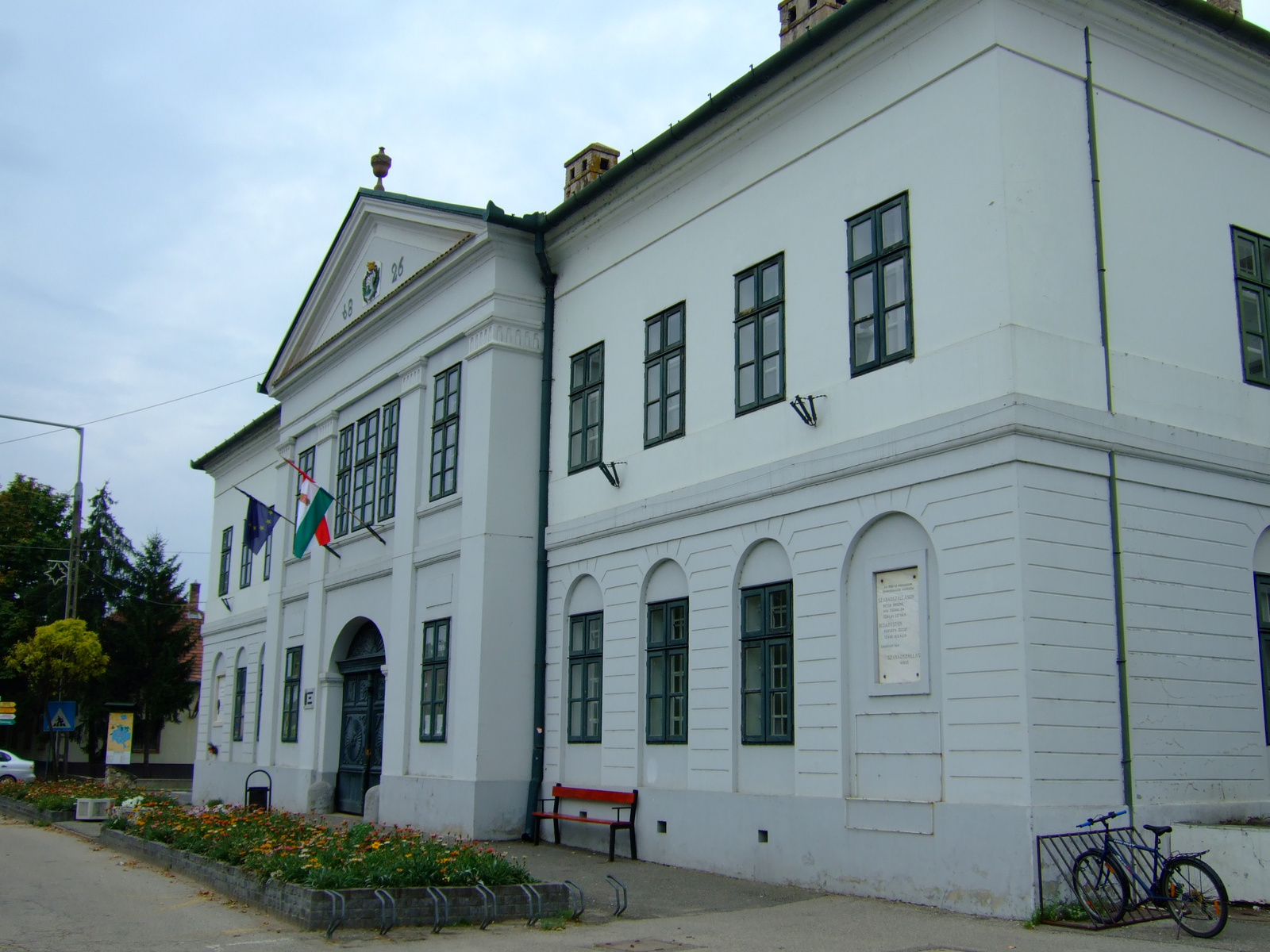 Városháza (Szabadszállás, Kálvin tér 1.) This is a photo of a monument in Hungary. Identifier: 2350